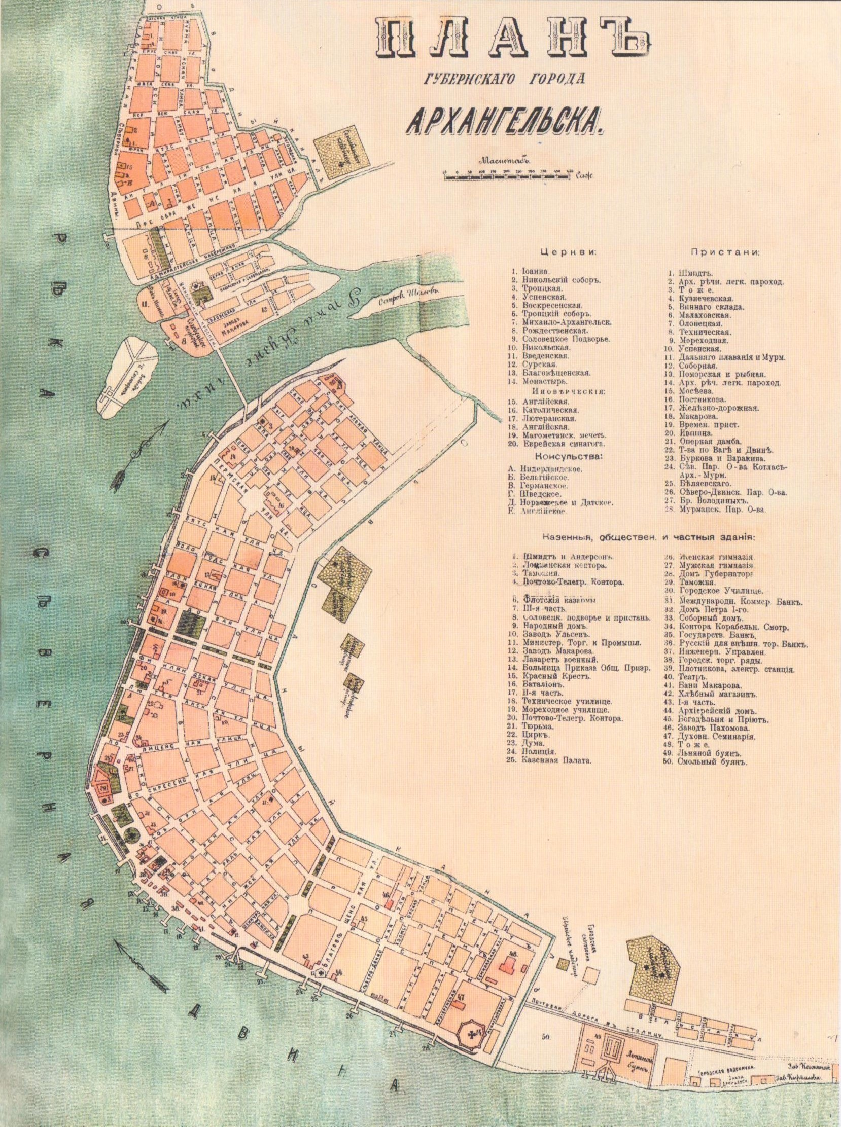 Карта губернского города Архангельска, типография С.Павлова, 1890.